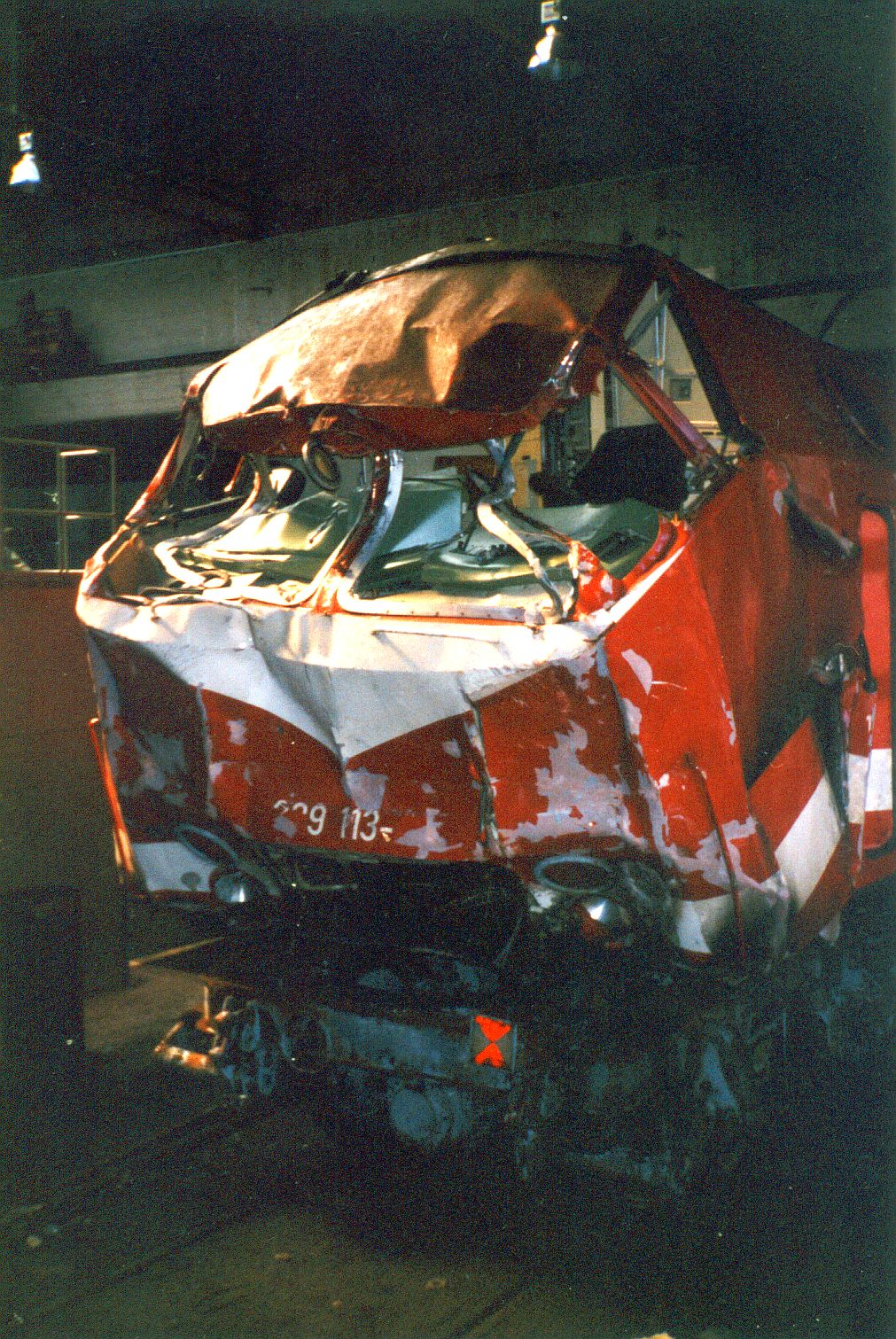 Unfalllokomotive Baureihe 229 113